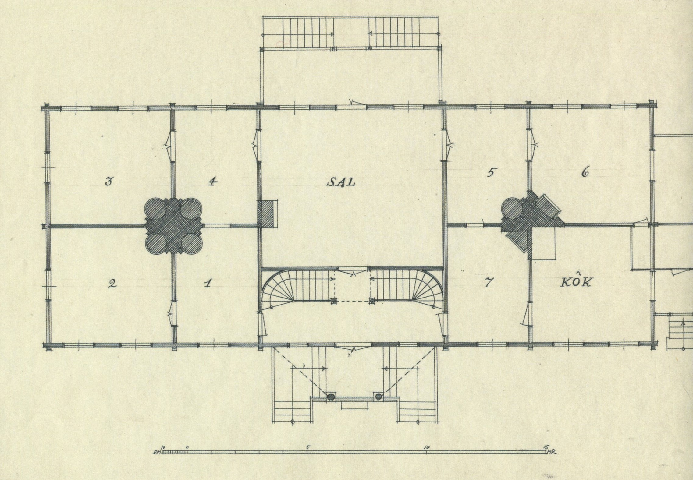 Fullersta gård, planritning, bottenvåning